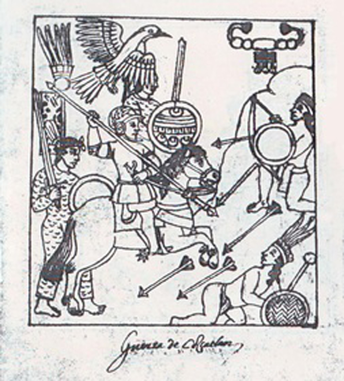 Escena del lienzo de Tlaxcala, copia ubicada en la Universidad de Glasgow, que representa la entrada a la ciudad de Cuzcatlán (sede del Señorío homónimo cuyo territorio cubría gran parte del occidente y centro de El Salvador) por los españoles liderados por Pedro de Alvarado y acompañado por un ejercito de Tlaxcaltecas, los pipiles son dibujados de un modo más tosco (a comparación de los Tlaxcaltecas) siendo representados como bárbaros o chichimecas.